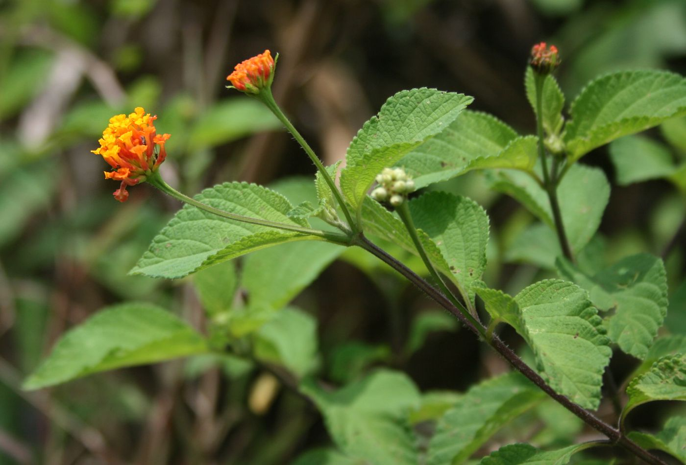 Lantana camara, Eisenkrautgewächse (Verbenaceae) - Costa Rica: Prov. Puntarenas, La Gamba NW Golfito, Valle Bonito